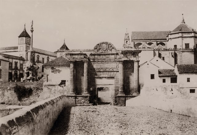 Puerta del Puente en 1852, Córdoba (España). Fotografía realizada por el fotógrafo Edward-King Tenison (1805-1878).